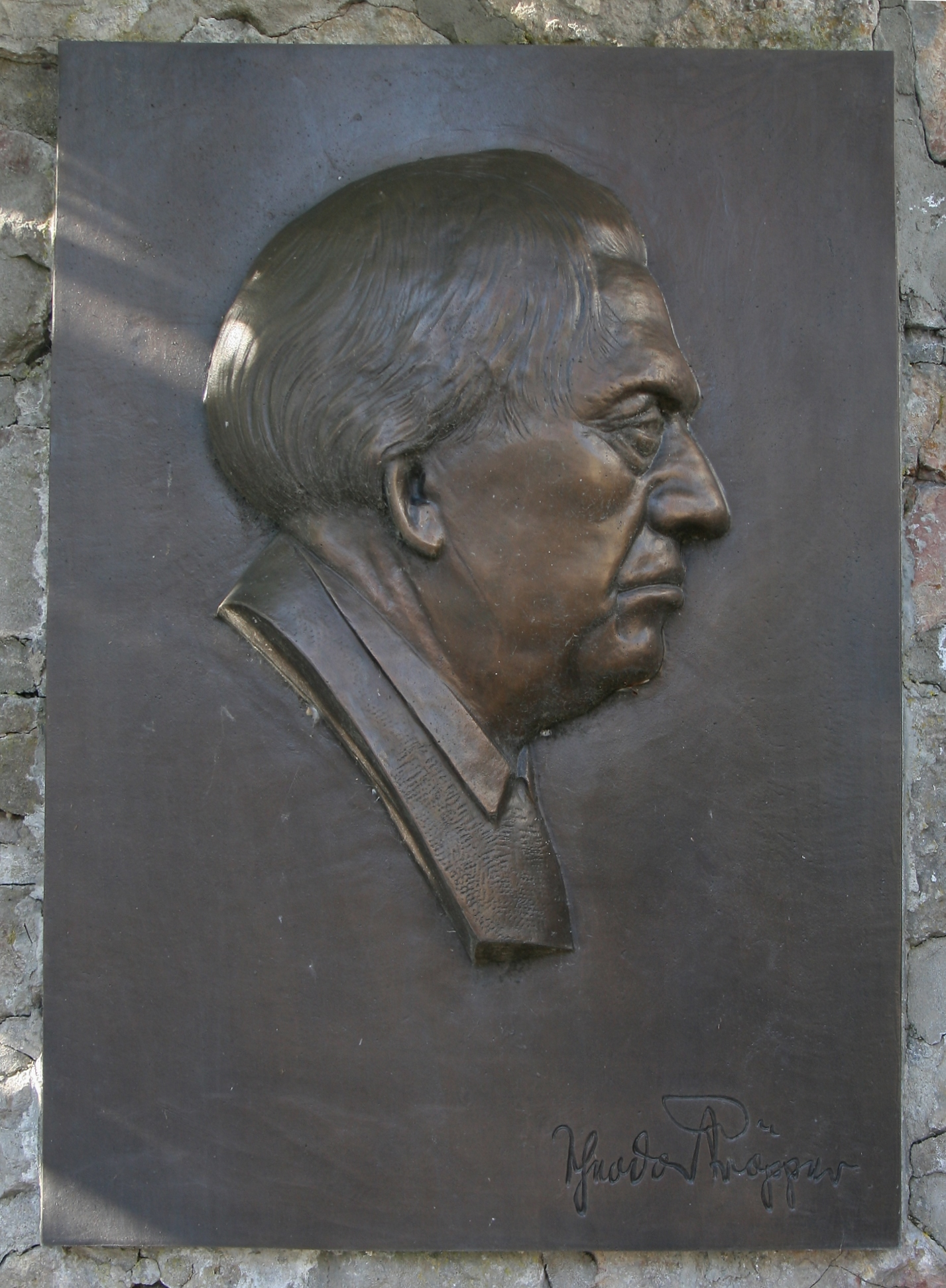 Relief von Theodor Pröpper am Hoffmeister-Pröpper-Brunnen in Balve, Hauptstraße.